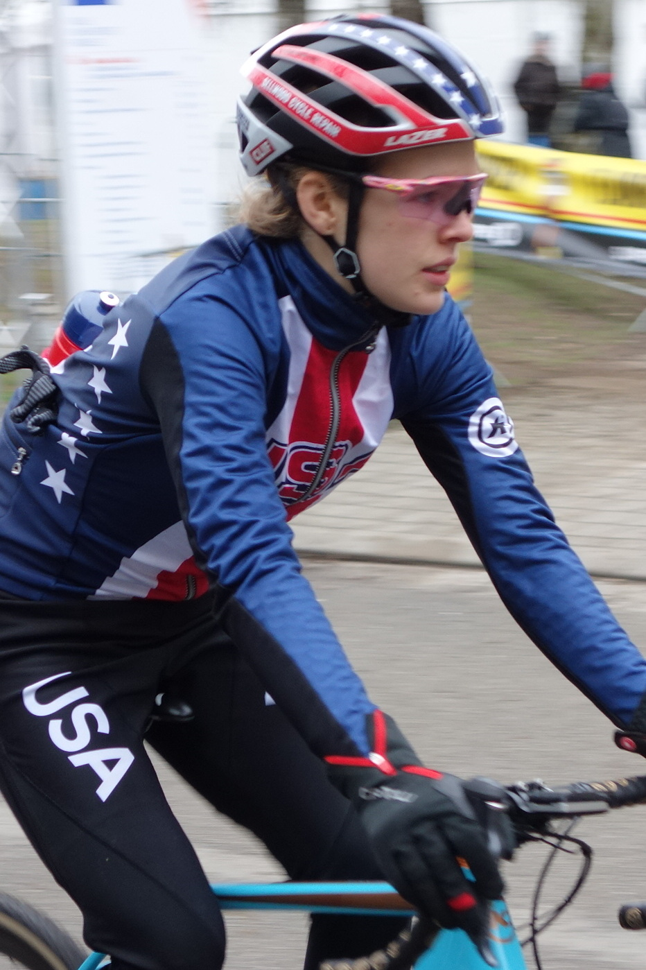 Voor de start van de tweede editie van de Brussels Universities Cyclocross (DVV Verzekeringen Trofee) op de campus van de VUB & ULB op zondag 5 januari 2020.